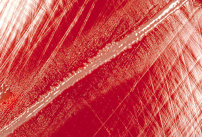 Satelliten-Phänomen von Haemophilus influenzae Staphylococcus aureus (dicker Impfstrich in der Mitte) Haemophilus influenzae (zarte Kolonien um den dicken Impfstrich)